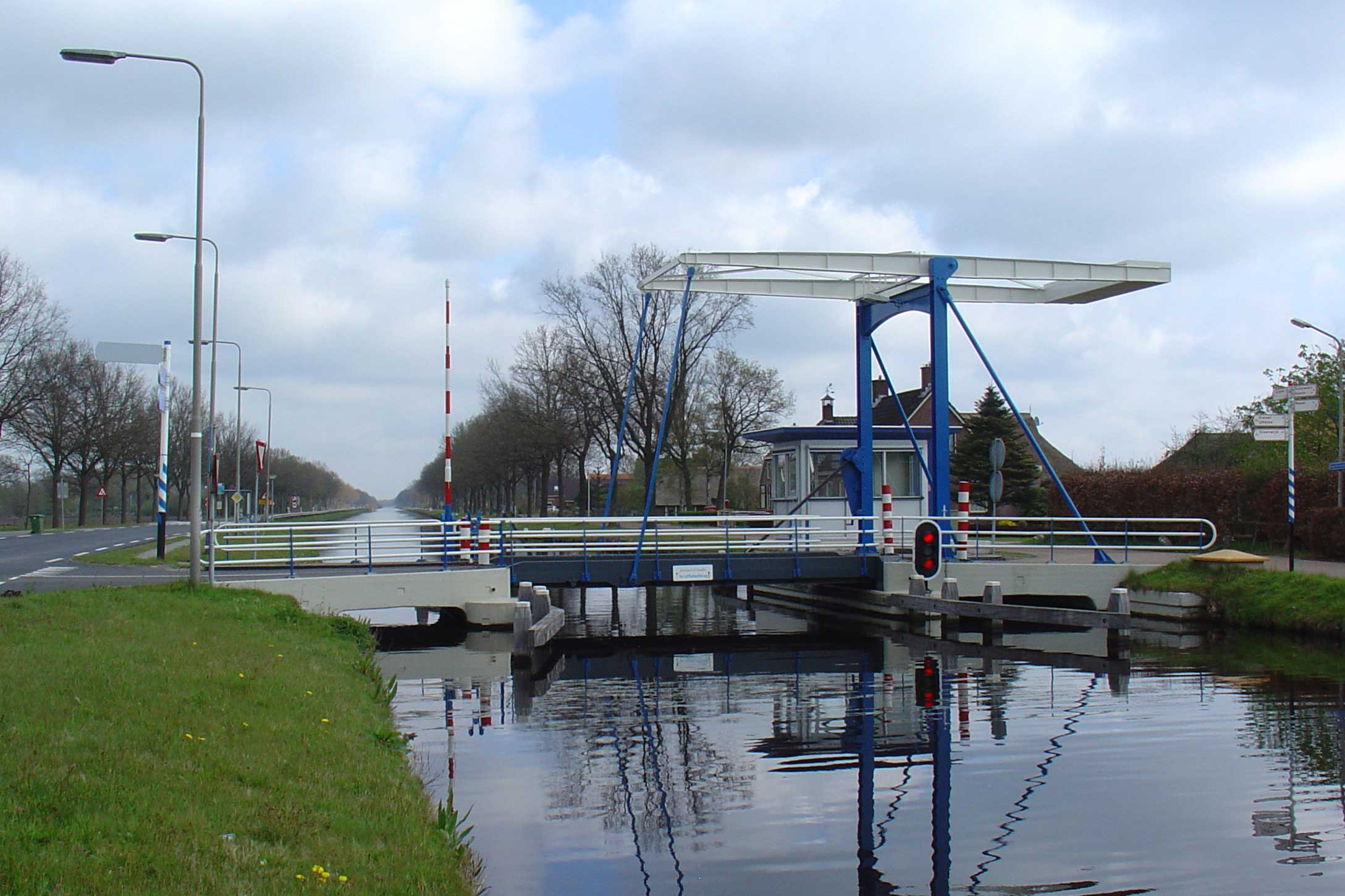 Drentsche Hoofdvaart met 1e Uffelterbrug